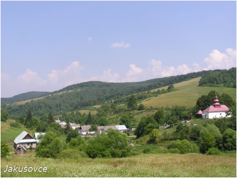 Celkový pohľad